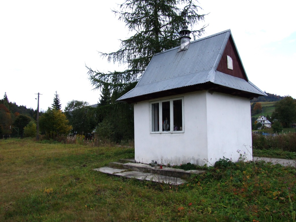 Kapliczka w Lubomierzu-Rzekach w Gorcach